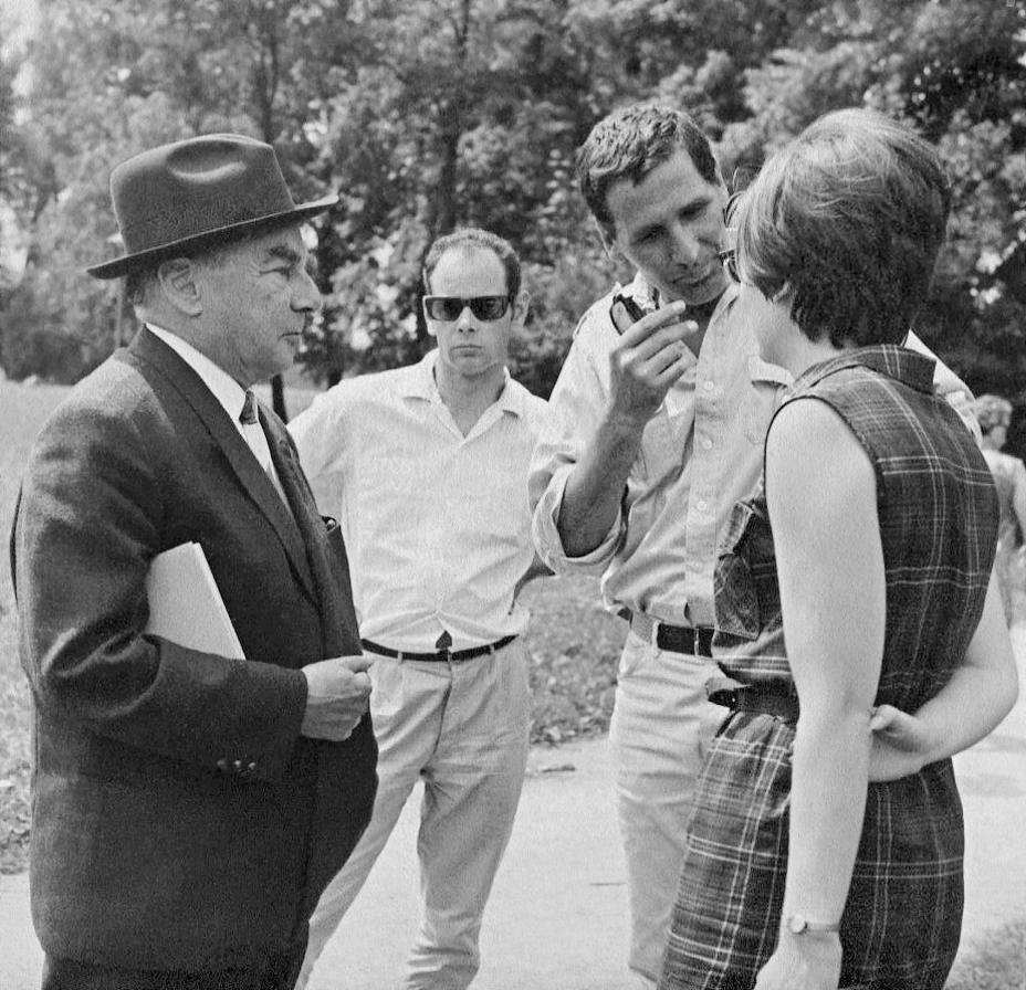 Erich Kästner bei Dreharbeiten im Englischen Garten in München mit Kameramann Peter Schneider (Mitte) und Regisseur Georg Armin für das Feature "Die heile Welt/Jugendbücher zwischen Märchen und Wirklichkeit" für das Dritte Programm des NDR-Fernsehens. Kästners letztes Fernsehinterview, er war schon sehr krank